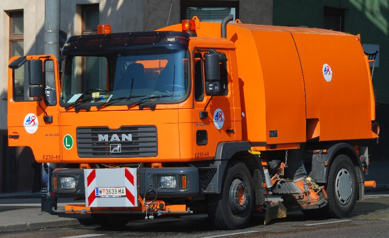 Straßenkehrmaschine, aufgebaut auf einem MAN (Wien)